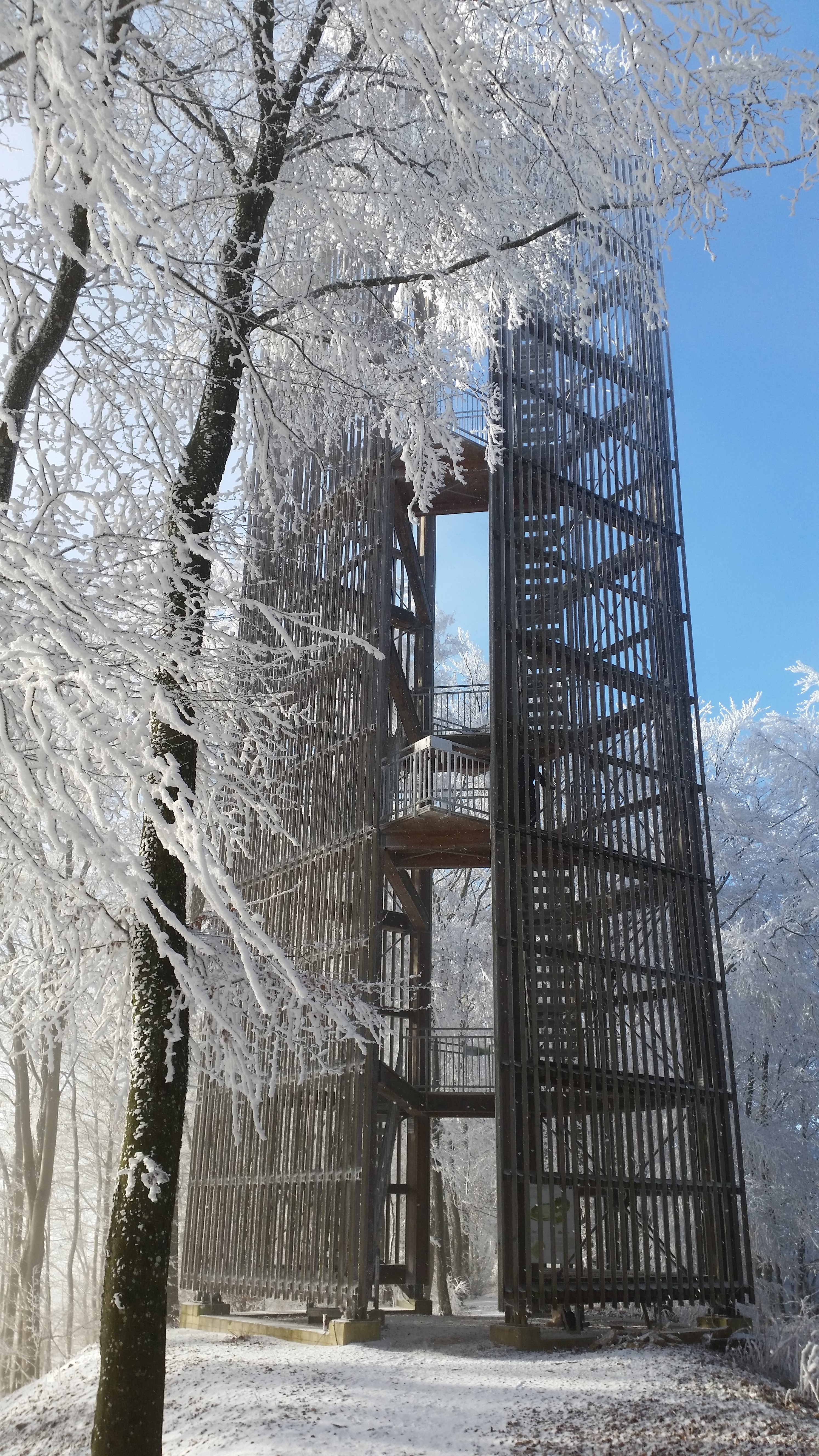 Cheisacherturm siehe cheisacher-turm.ch